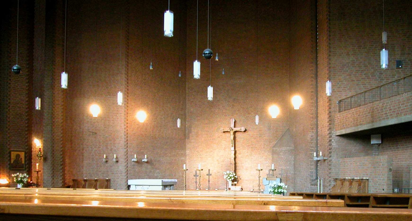 St. Michael in Dormagen, NRW, Deutschland